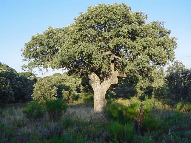 Encina en la Sierra de Ávila, España